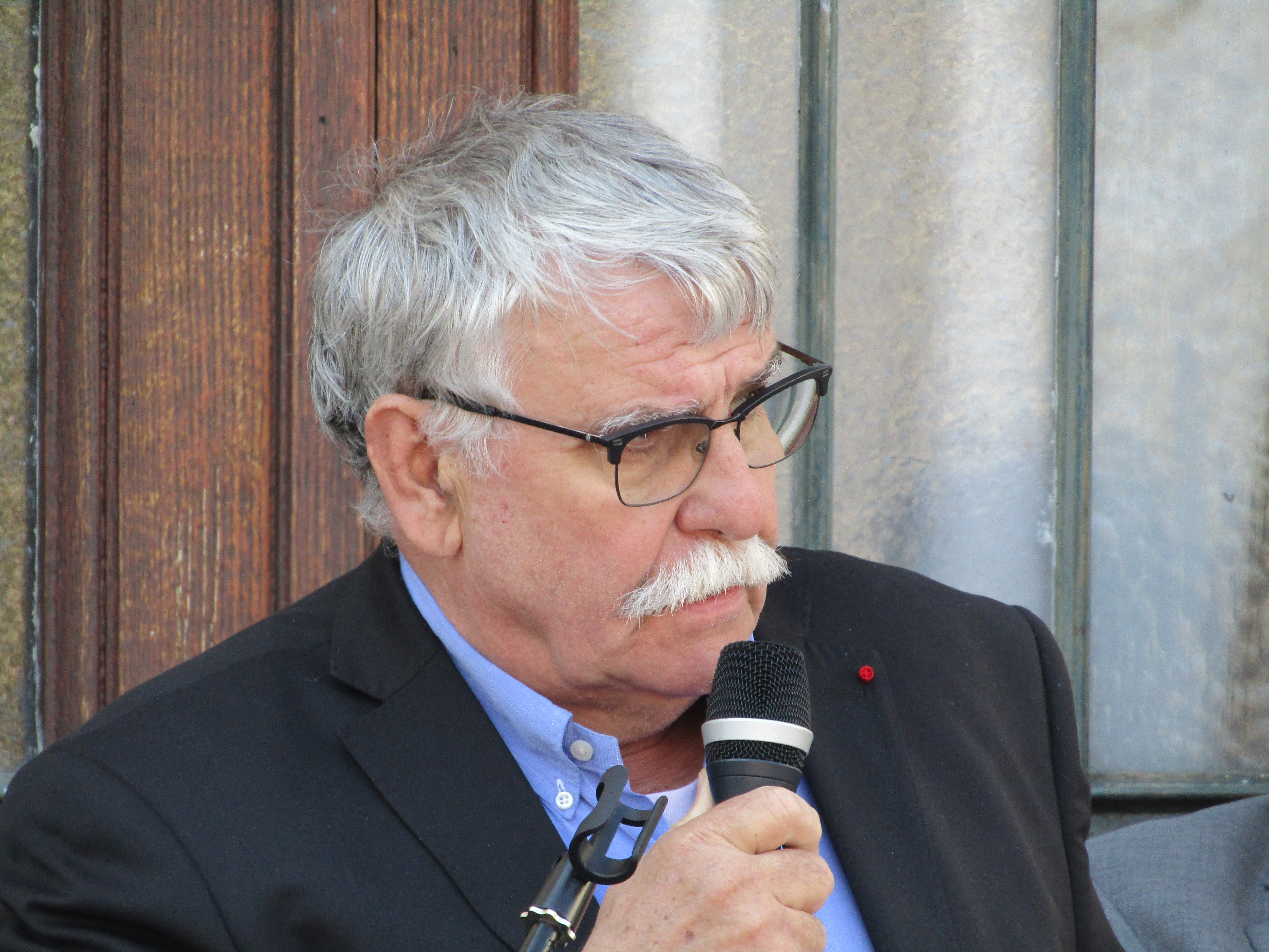 Gérard Simonnet, maire de la ville de Moirans (isère)